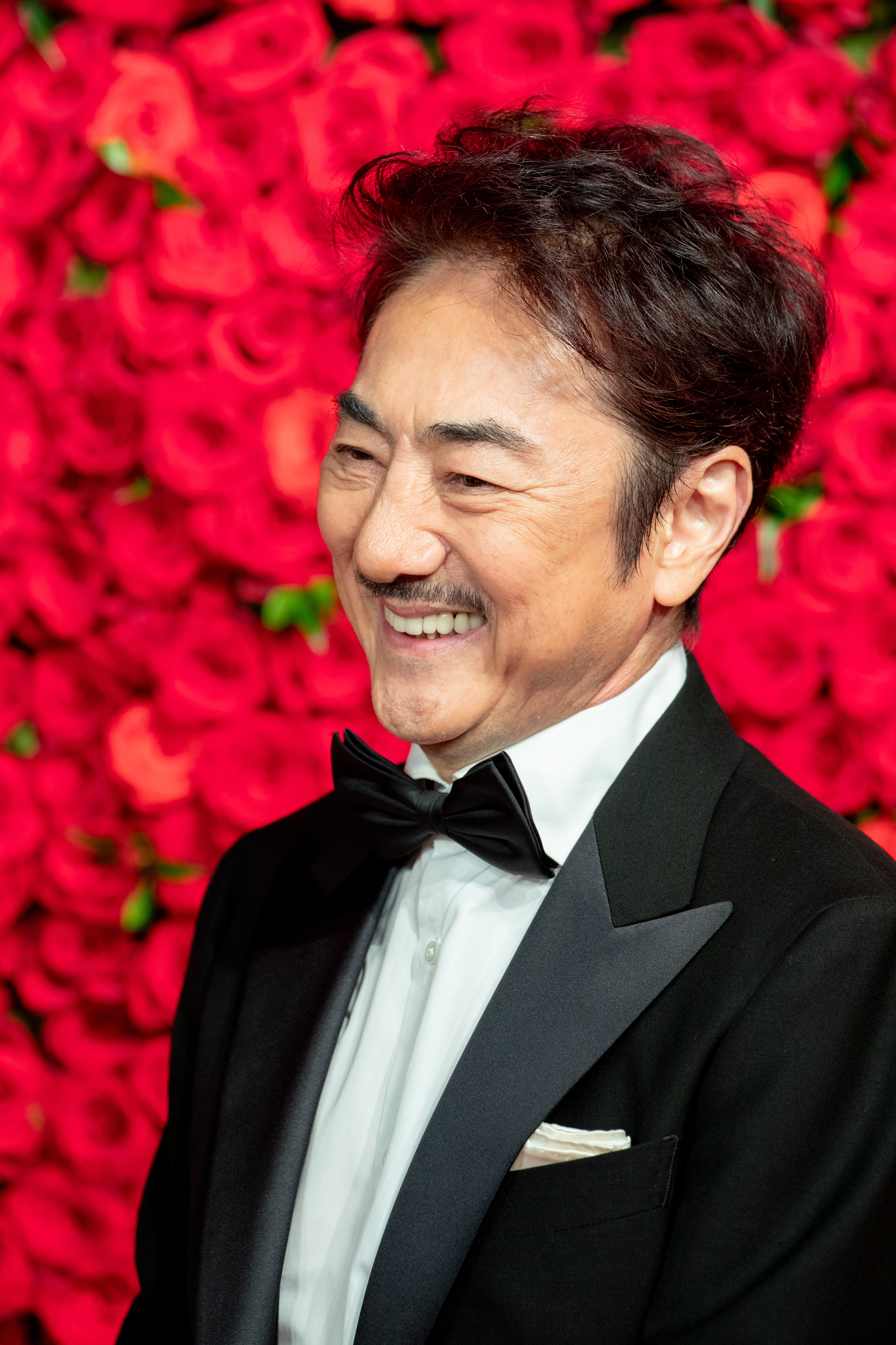 第30回 東京国際映画祭 オープニングセレモニー 市村正親 (Merry Christmas!～ロンドンに奇跡を起こした男～)